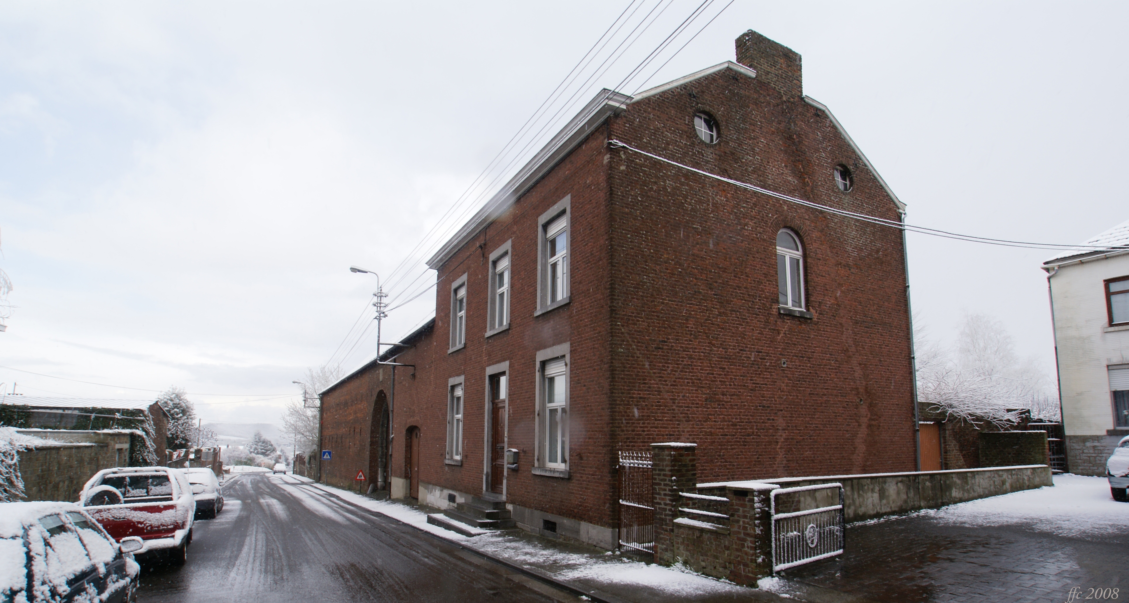 Mons-lez-Liège (Belgium) Thier Saint-Léonard